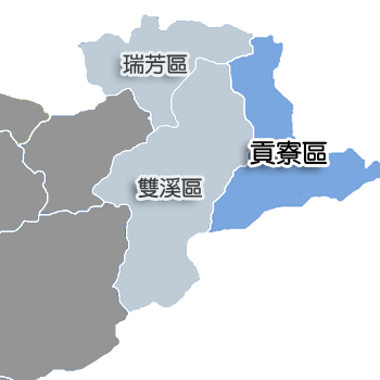 貢寮區相對位置。